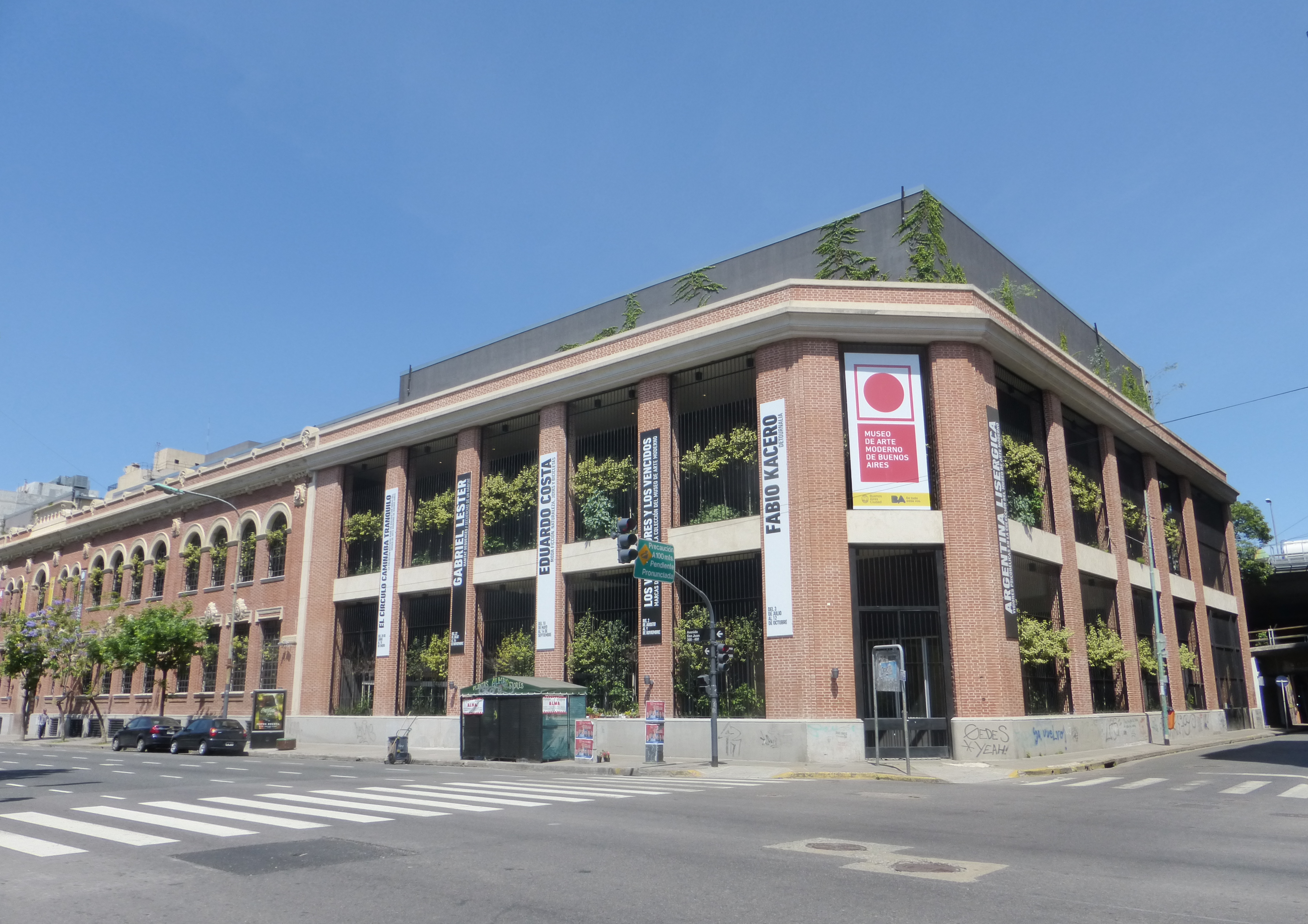 Fachada del Museo de Arte Moderno de Buenos Aires, ubicado en el barrio porteño de San Telmo.